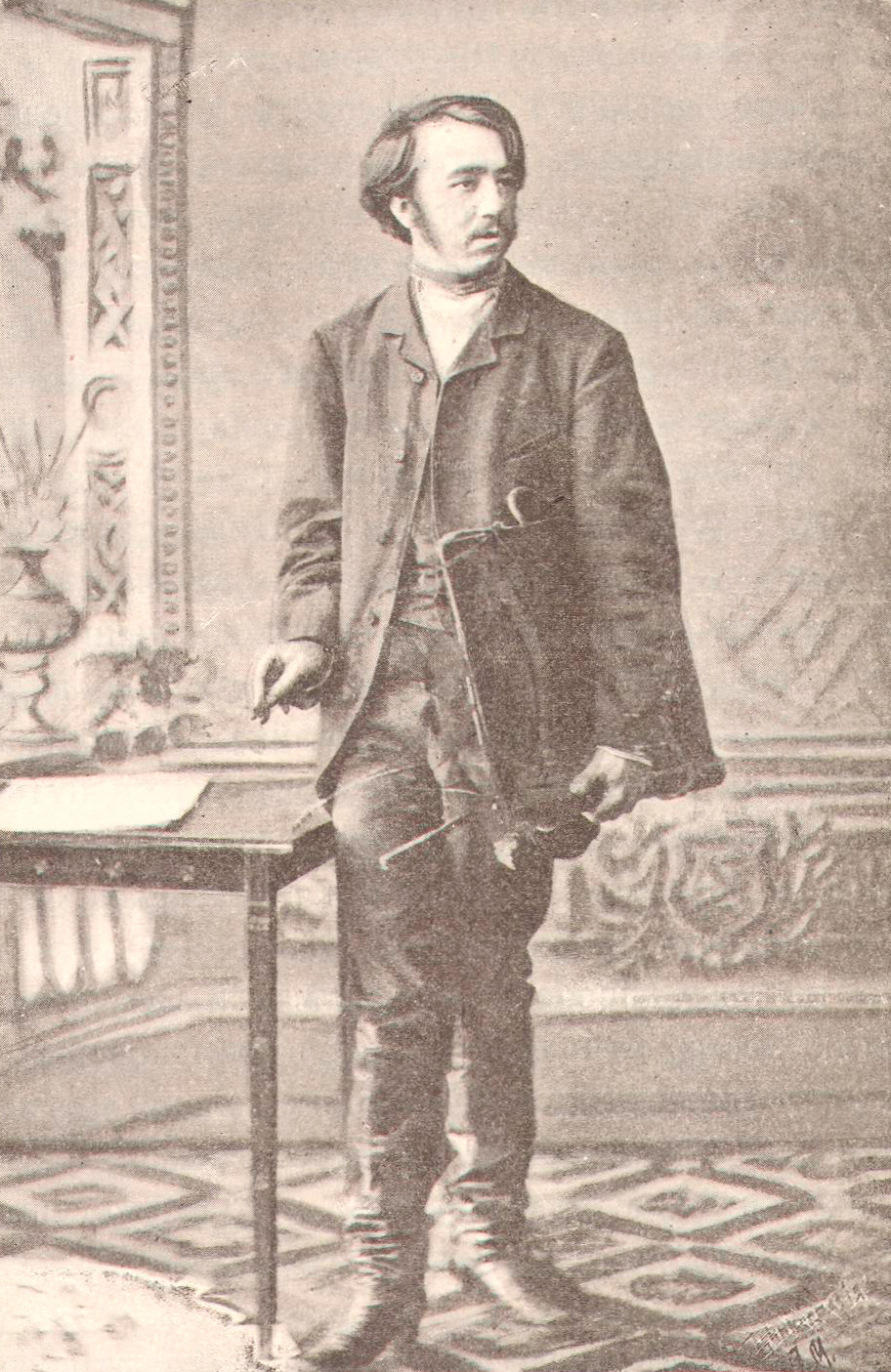 Андрей Николаевич Краснов в студенческие годы